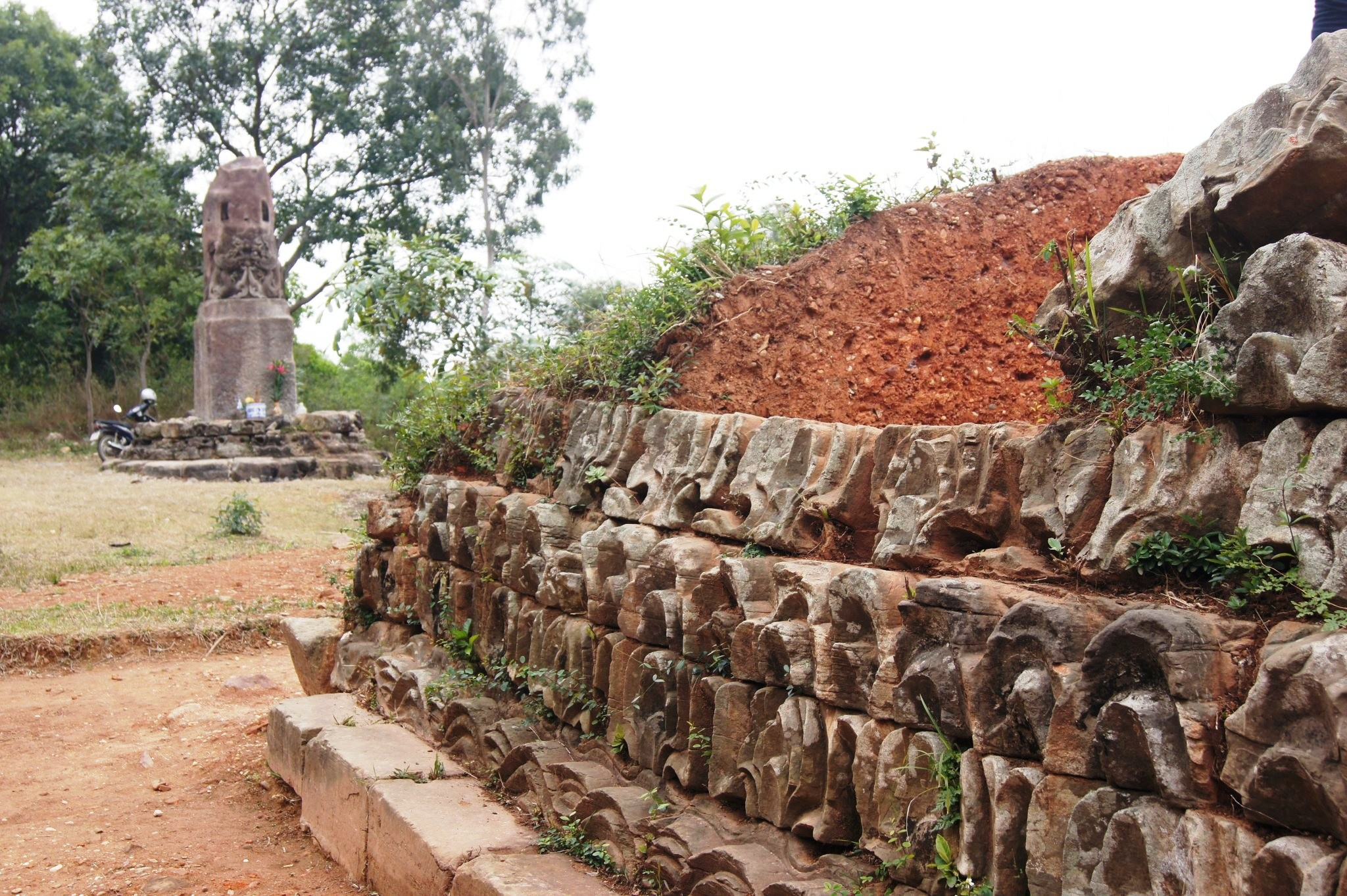 Chân tháp nằm đối diện với cột đá chùa Dạm mang họa văn trang trí thời Lý.